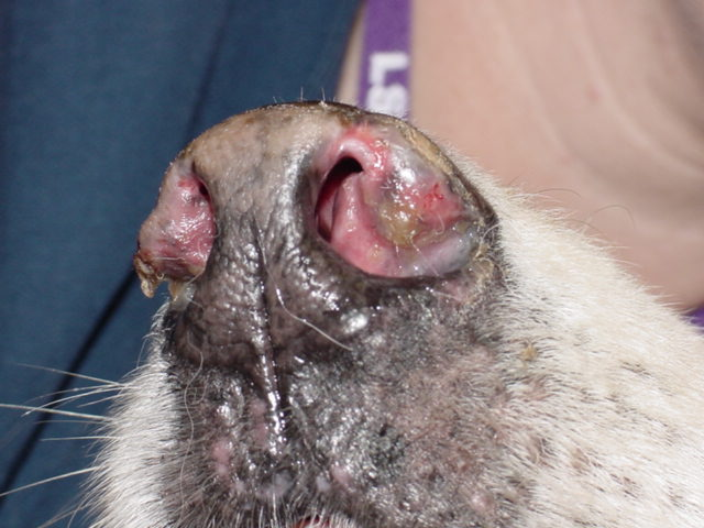 canine cutaneous lupus of the planum nasale / discoid lupus